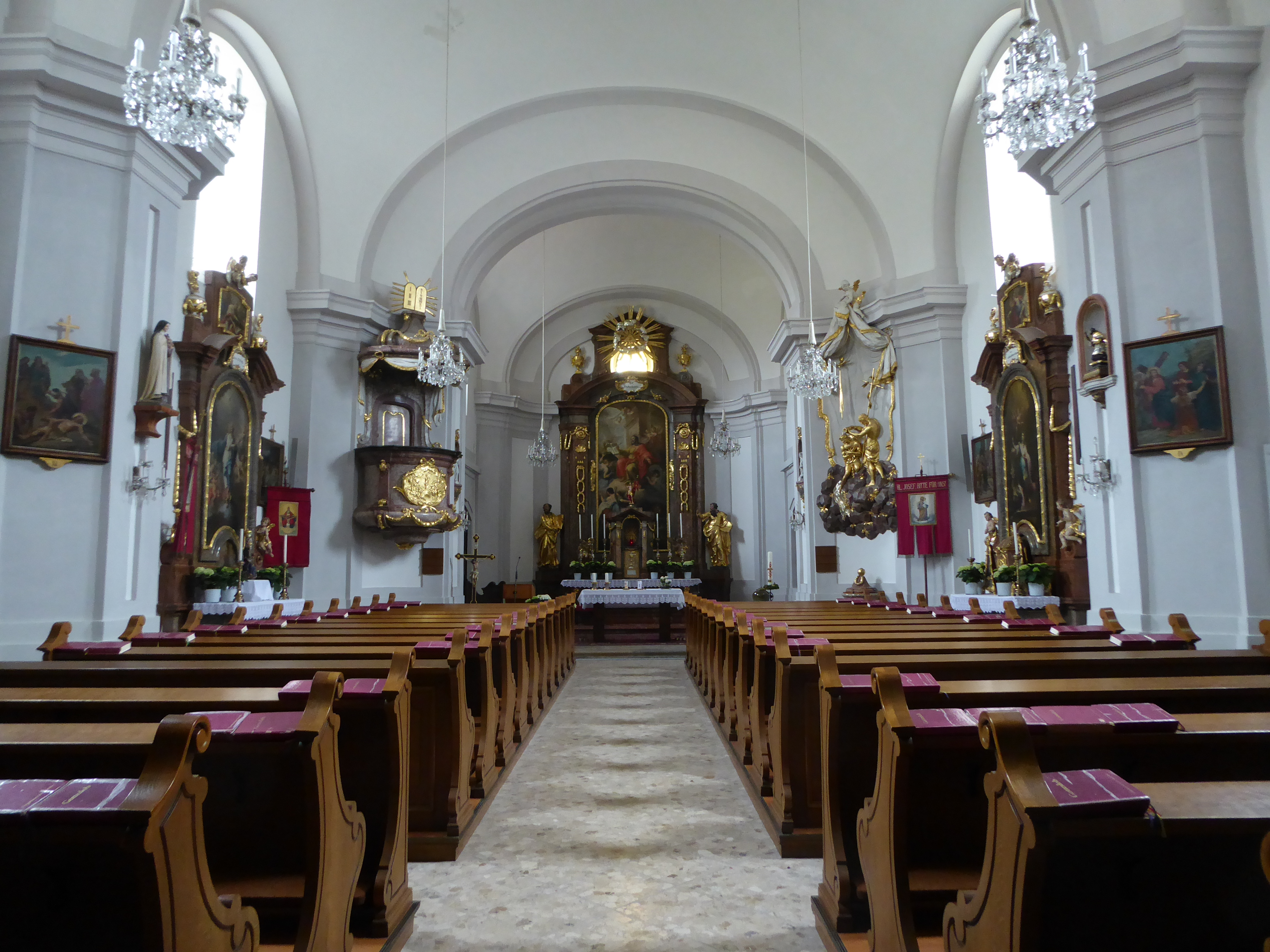 Pfarrkirche hl. Markus, Leopoldsdorf im Marchfelde, Niederösterreich